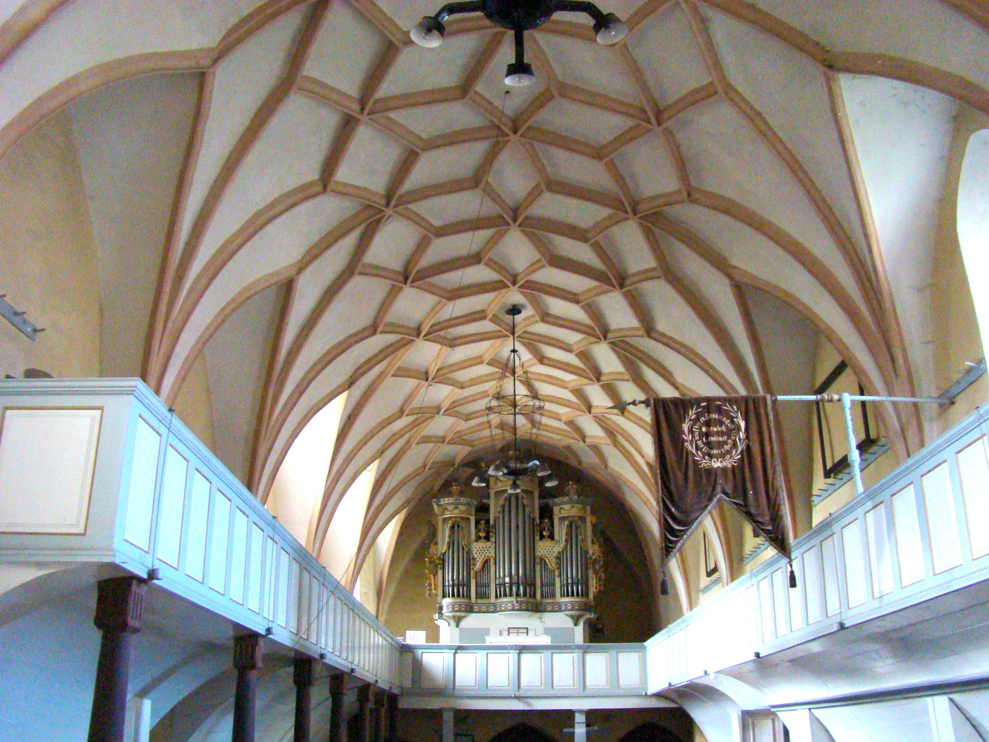 Biserica evanghelică fortificată din Valea Viilor, județul Sibiu 01